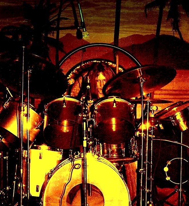 Ricky van Helden (1980)